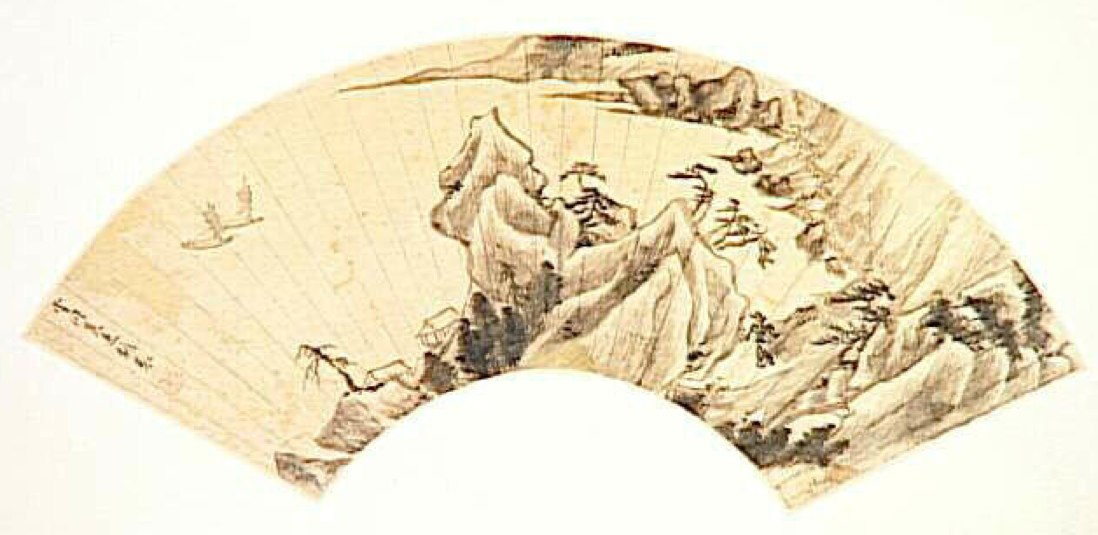 Paysage, par le peintre chinois Mo Shilong du XVIe-XVIIe siècle, éventail représentant un massif rocheux avec des pins. A gauche, deux pavillons, à droite, un homme sur mulet franchit la passerelle. Un sentier dans la montagne et un vaste plan d'eau avec deux barques à voiles. Vers 1567-1600, signé et cachet du peintre, encre sur fond or. H. 15.7 ; L. 49 centimètres. Conservé au Paris ; musée national des Arts asiatiques - Guimet. propriété de l'Etat ; achat ; musée national des Arts asiatiques - Guimet. Date acquisition 1948. Anciennes appartenances Dubosc, J.P., Paris Numéro d'inventaire MA 490 Anciennes appartenances Dubosc, J.P., Paris Numéro d'inventaire MA 490.